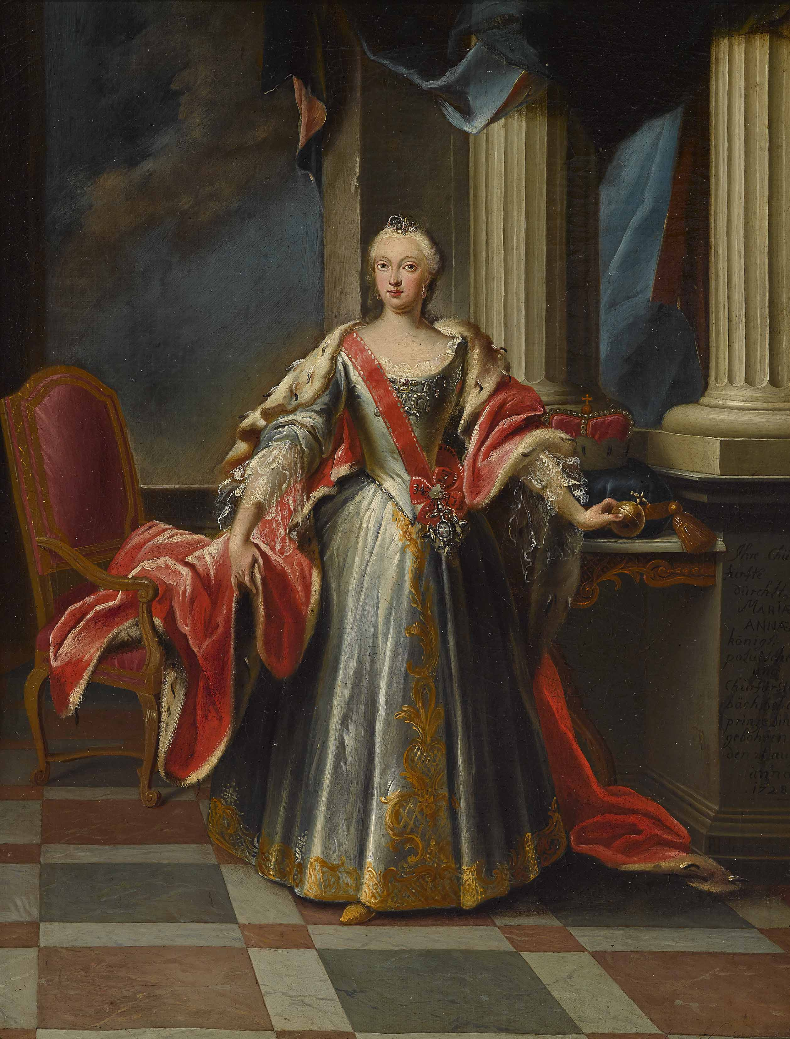 Kurfürstin Maria Anna Sophie von Bayern, Prinzessin von Polen und Sachsen (1728–1797)